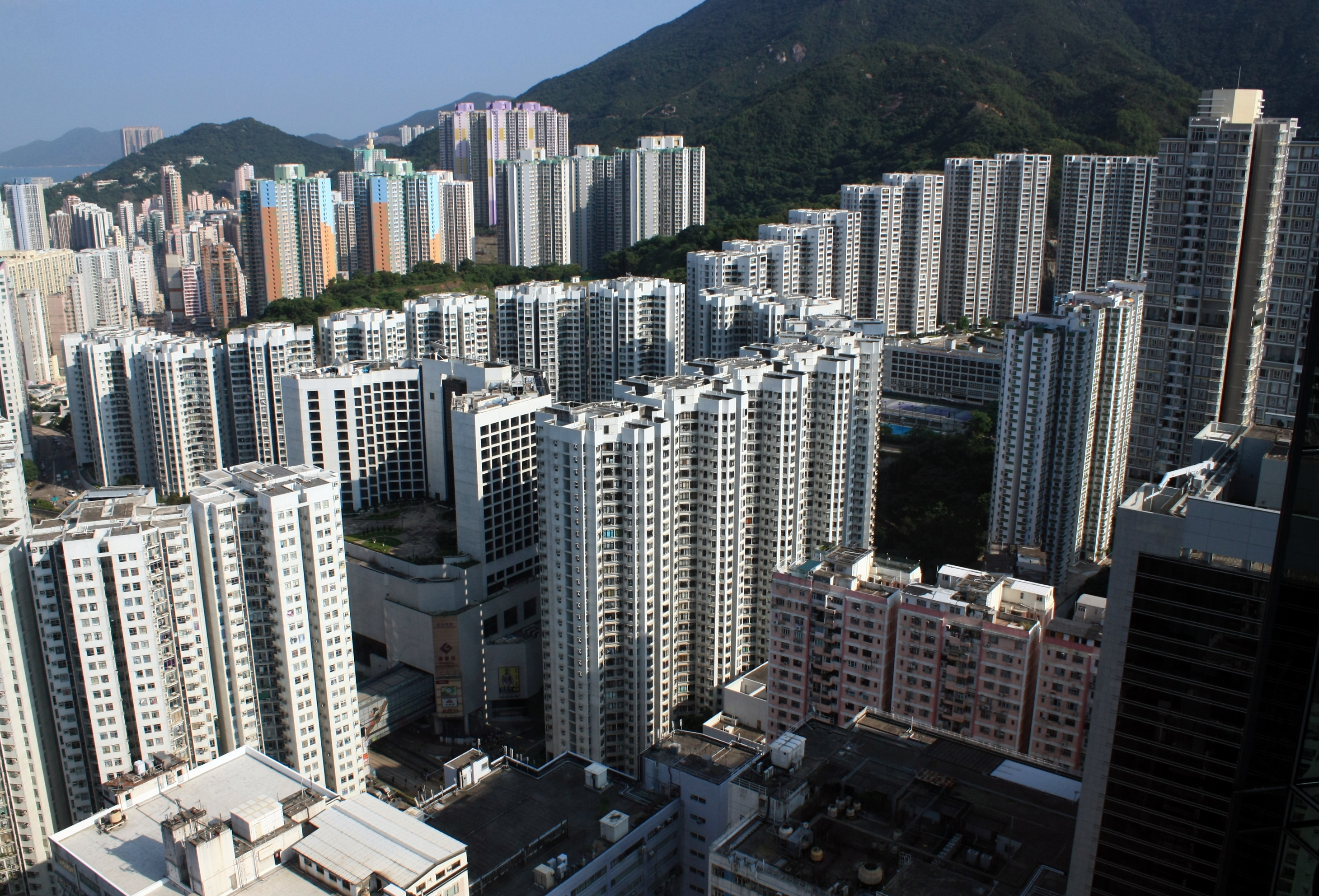 Kornhill 康怡花園